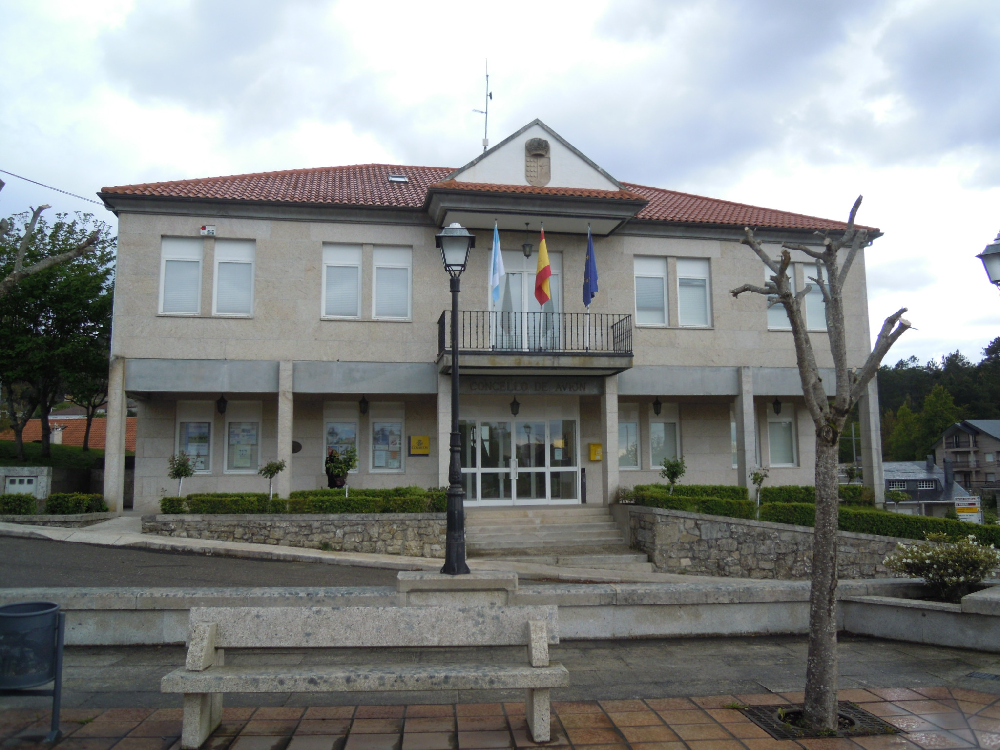 Casa consistorial de Avión